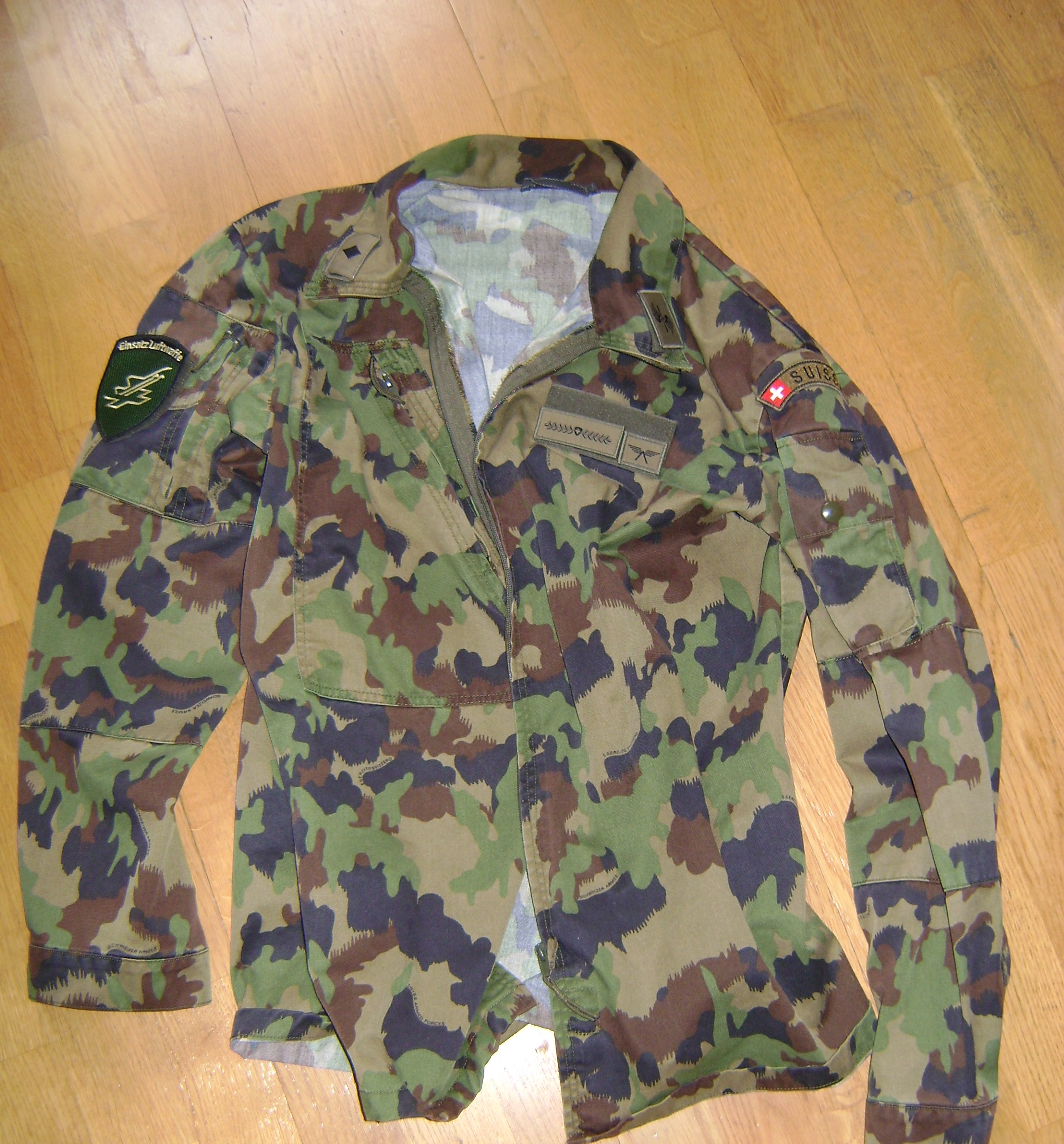 TAZ90 Jacke